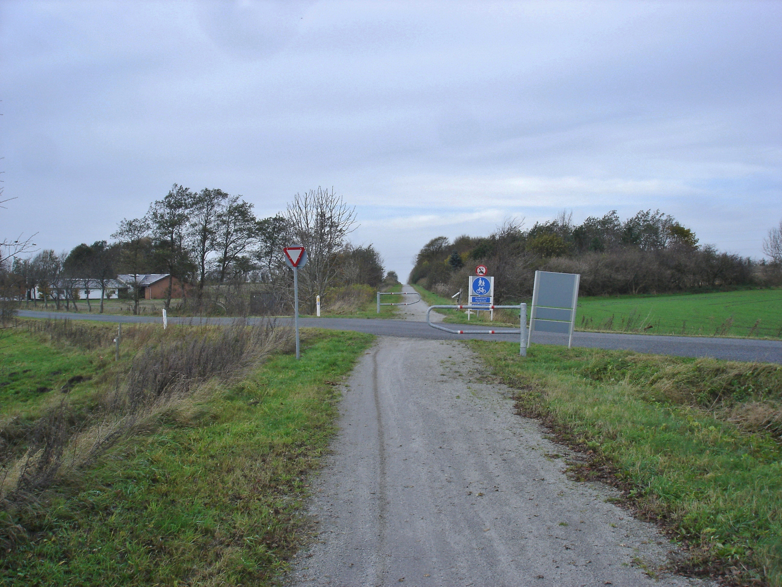 Himmerlandsstien krydser Hvorvarpvej mellem Aars og Hornum